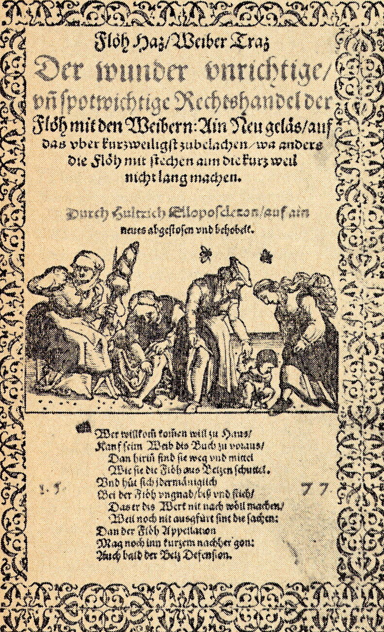 Titelblatt der Ausgabe von Flöh Hatz Weiber Tratz Der wunder unrichtige und spotwichtige Rechtshandel der Flöh mit den Weibern: Ain Neu geläs auf das ueberkurzweiligst zu belachen wa anders die Flöh mit stechen aim die kurzweil nicht lang machen. Durch Hultrich Elloposcleron [= Johann Fischart] auf ain neues abgestosen und behobelt. Straßburg 1577